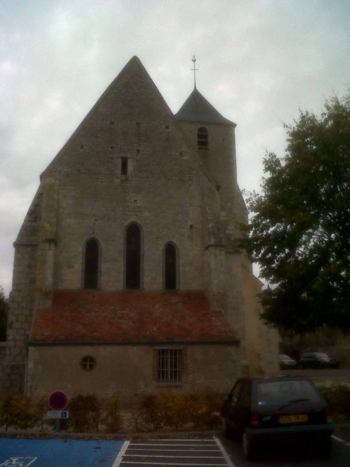 Eglise vue de derrière